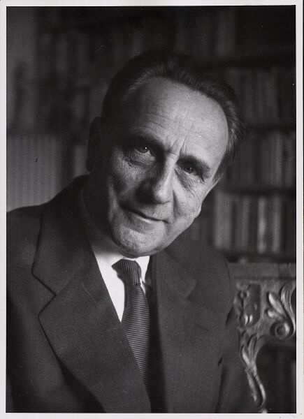 Porträt von Gustav Eichelberg